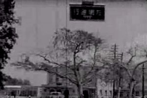 日治時期台灣台南驛前景像 取自